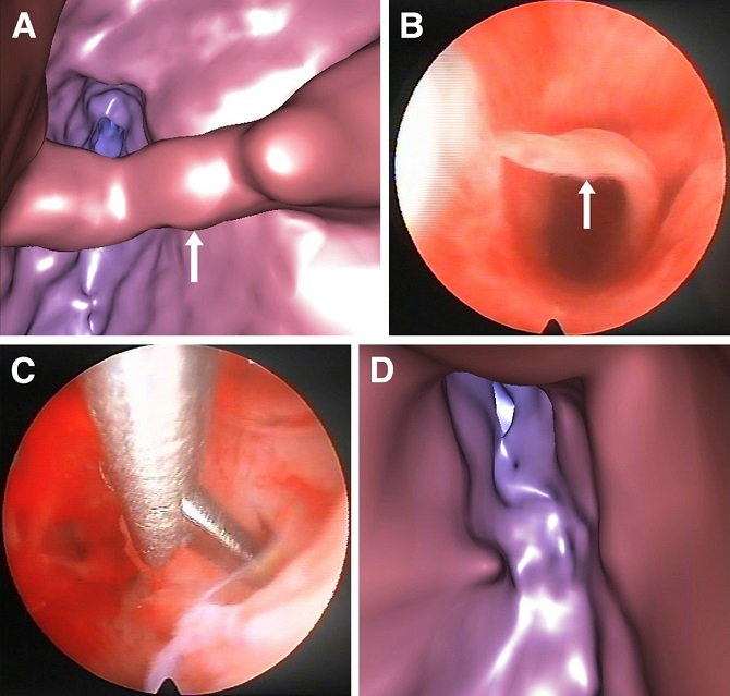 Histeroscopia